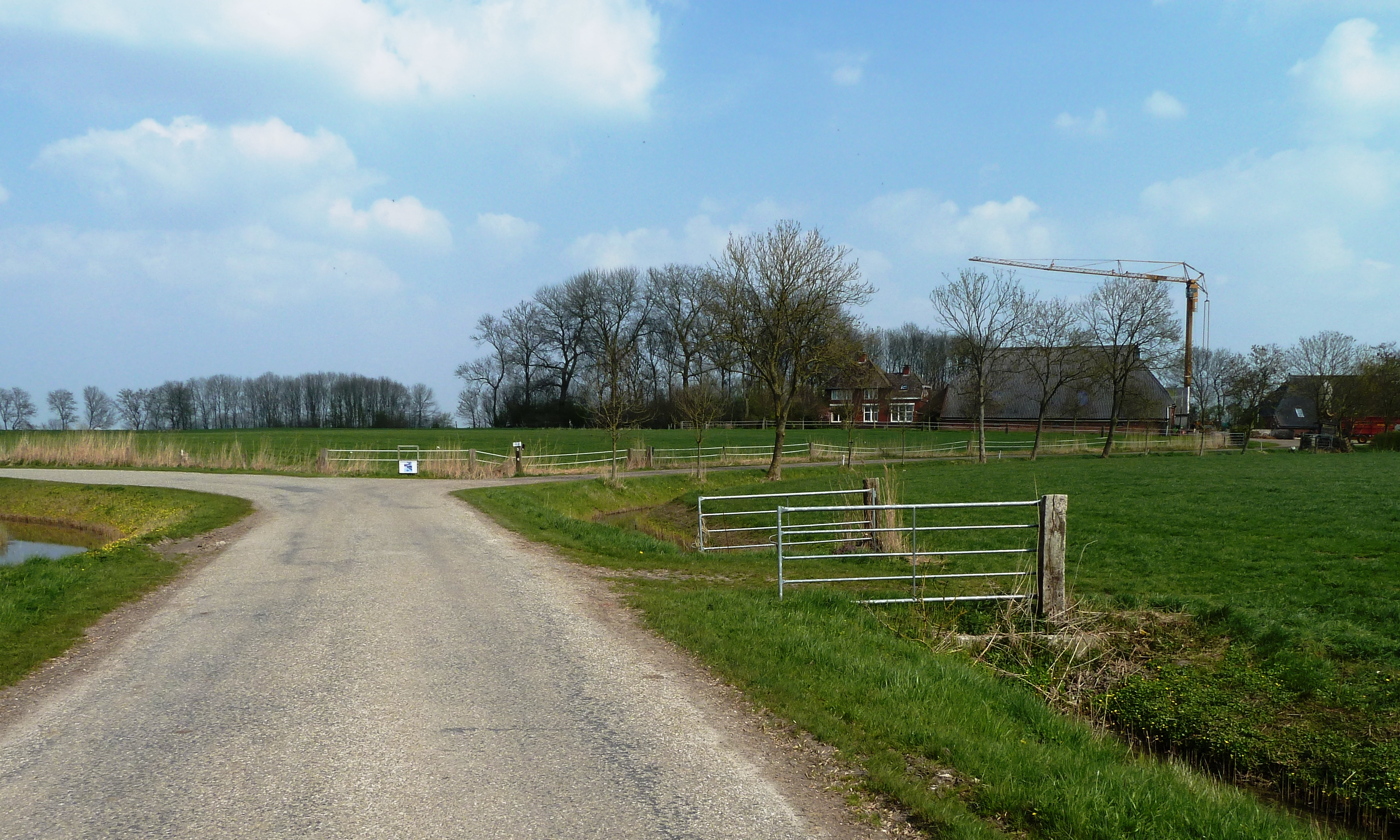 Gezicht op het rechterdeel van de wierde Ranum bij Winsum (Groningen, Nederland) vanuit het zuidwesten. Bij het bosje middenvoor ligt het kerkhof. De weg naar rechts is nu een eigen weg maar liep vroeger door tot in de Ranumer Meeden.